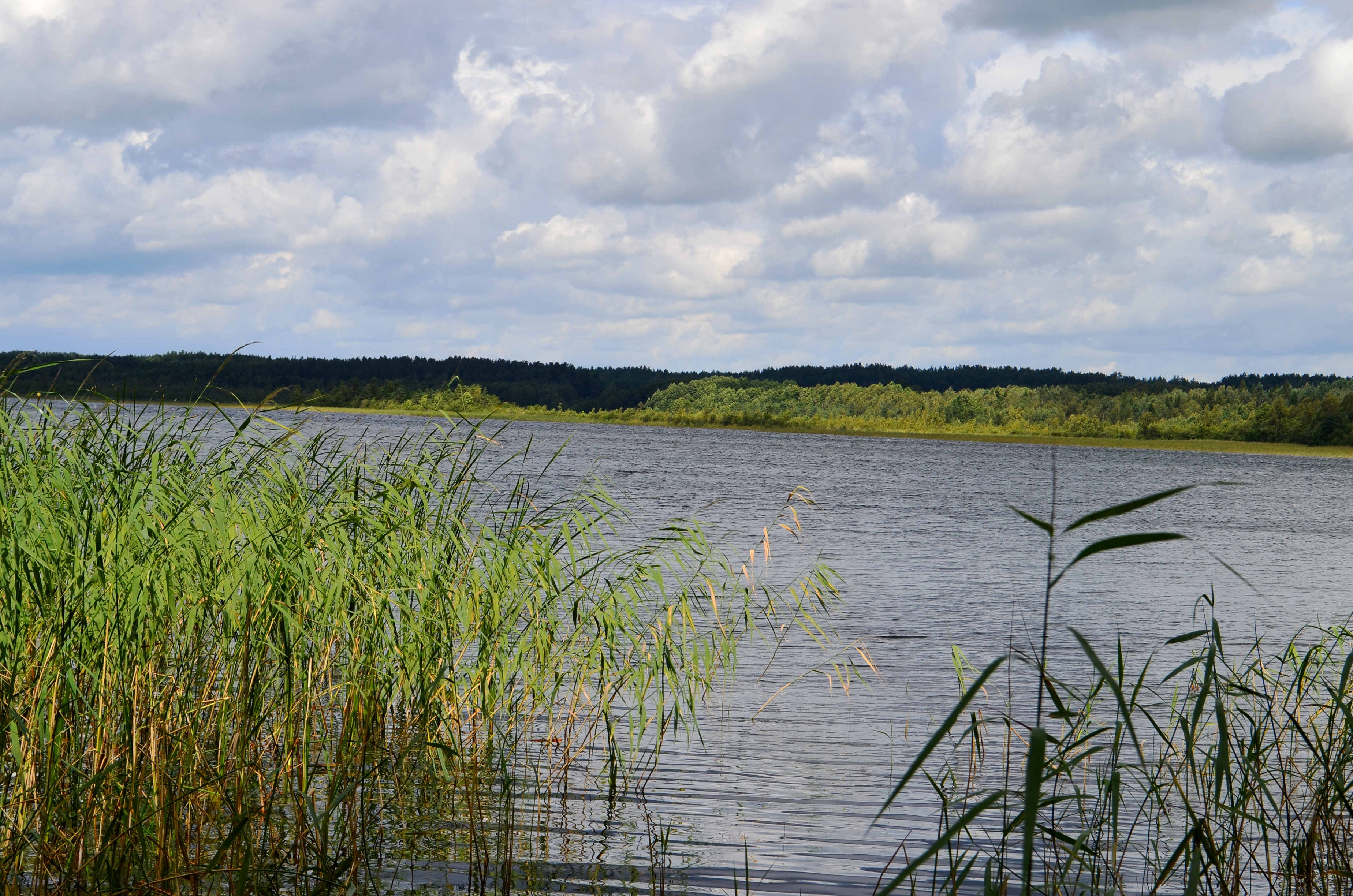 Stirnių ežero (Molėtų raj.) rytinis galas